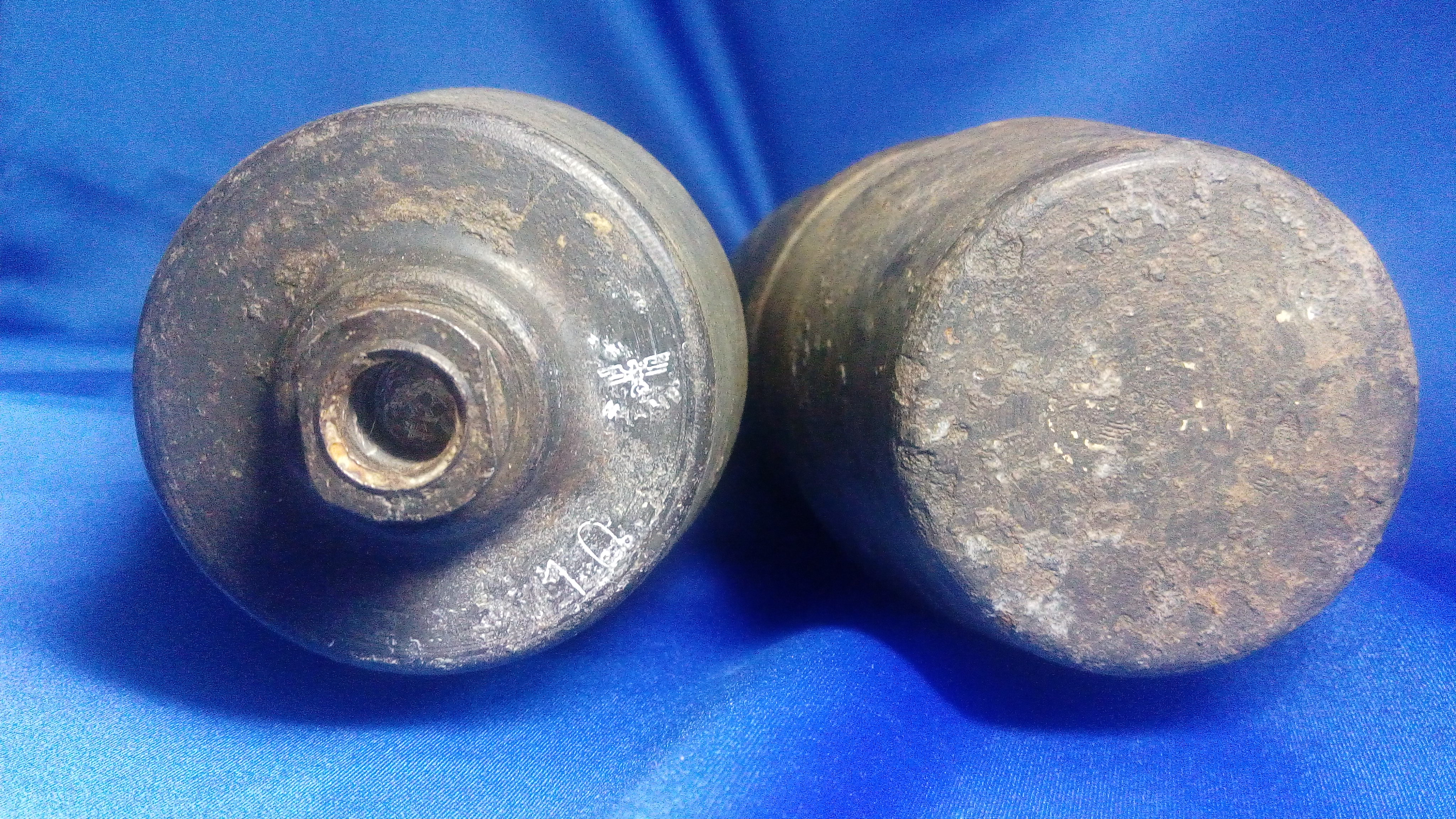 Донная часть снарядов Pak 36, с клеймами немецкой приемки